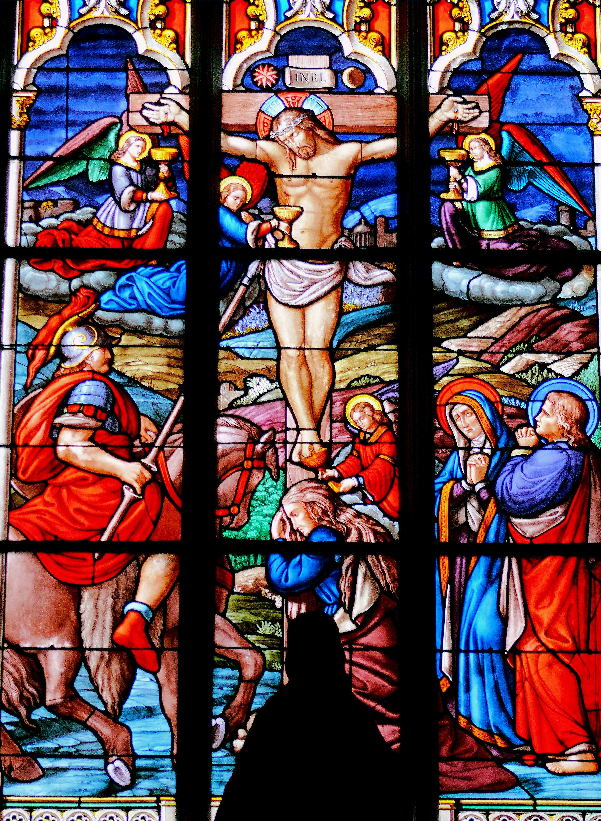 La Ferté-Bernard - Eglise Notre-Dame-des-Marais - Crucifixion (XIXe siècle)